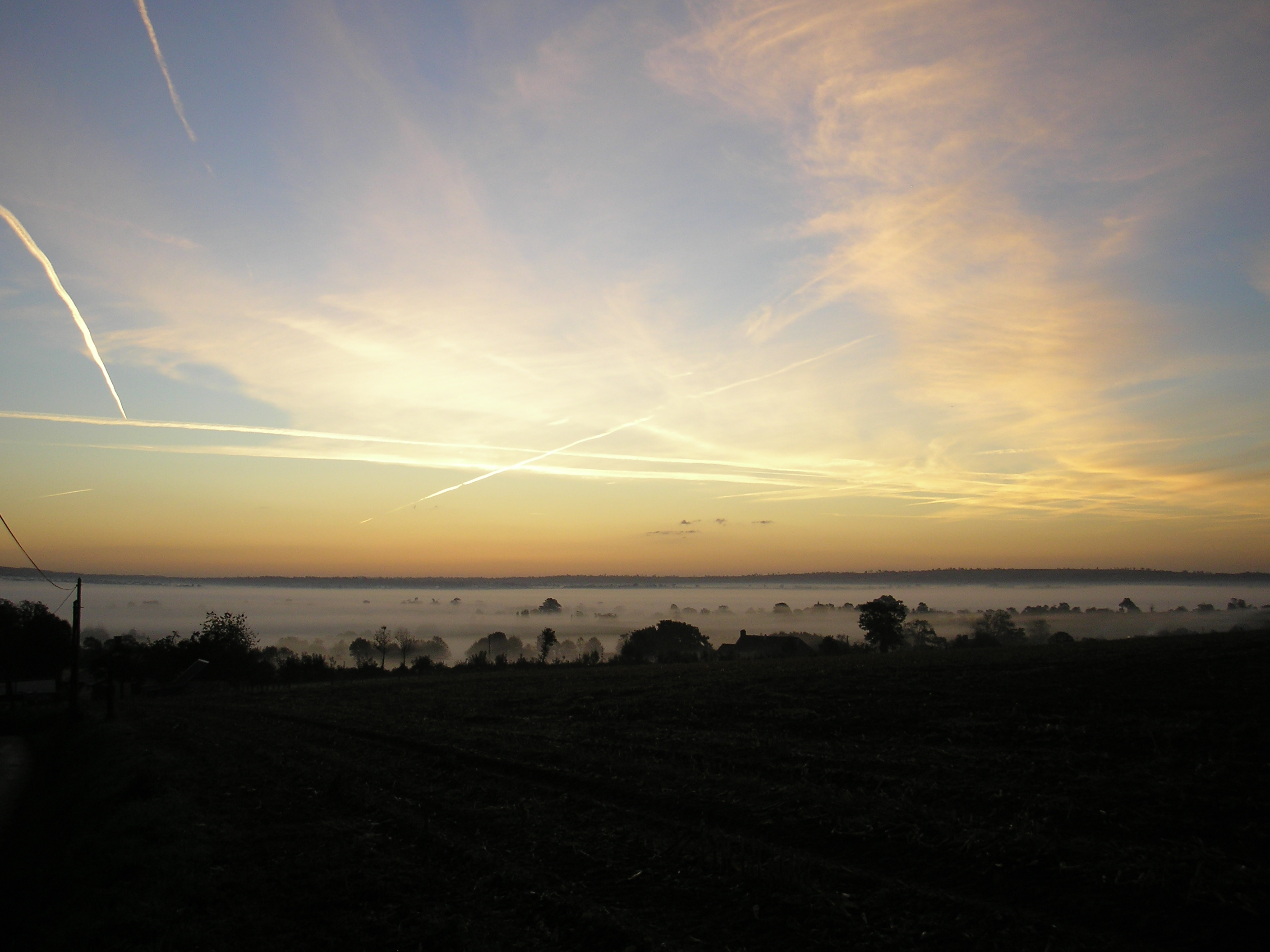 Sainte-Marie-Laumont (Normandie, France). Brume sur le bassin de la Vire vu du hameau de la Balle vers l'est, au levant.